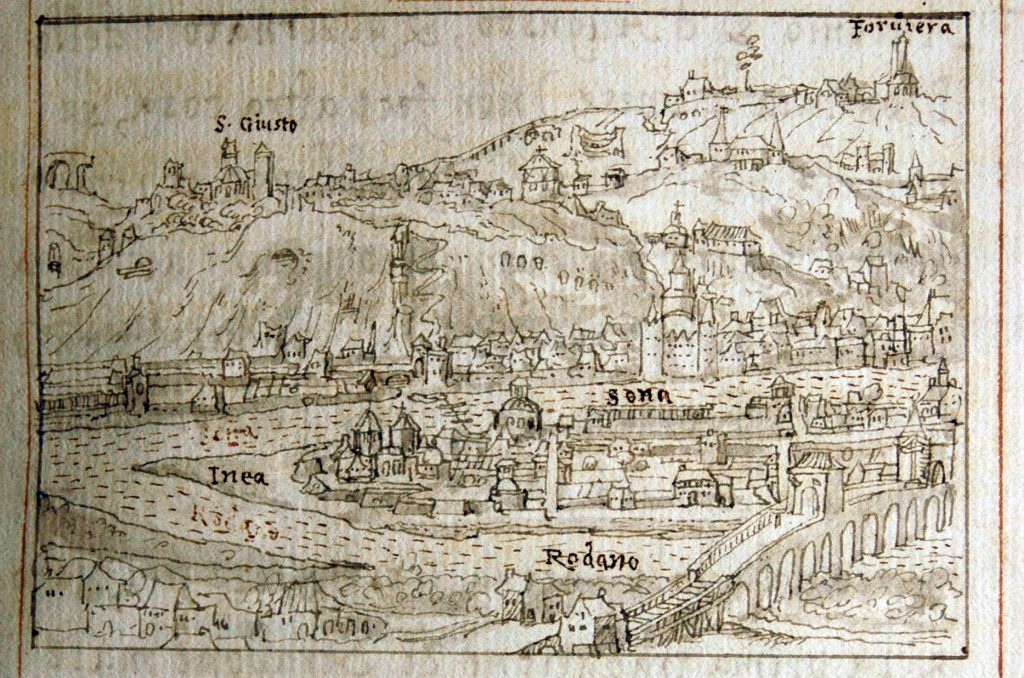 Vue de Lyon, tirée du livre L'Origine et le antichità di Lione, de Gabriele Simeoni (1559).